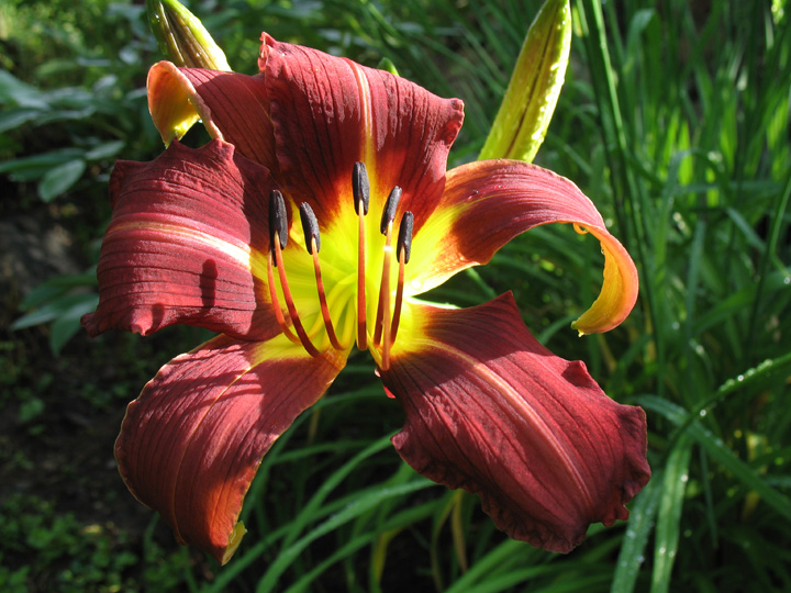 Hémérocalle (Hemerocallis) Photo prise au Québec, Canada